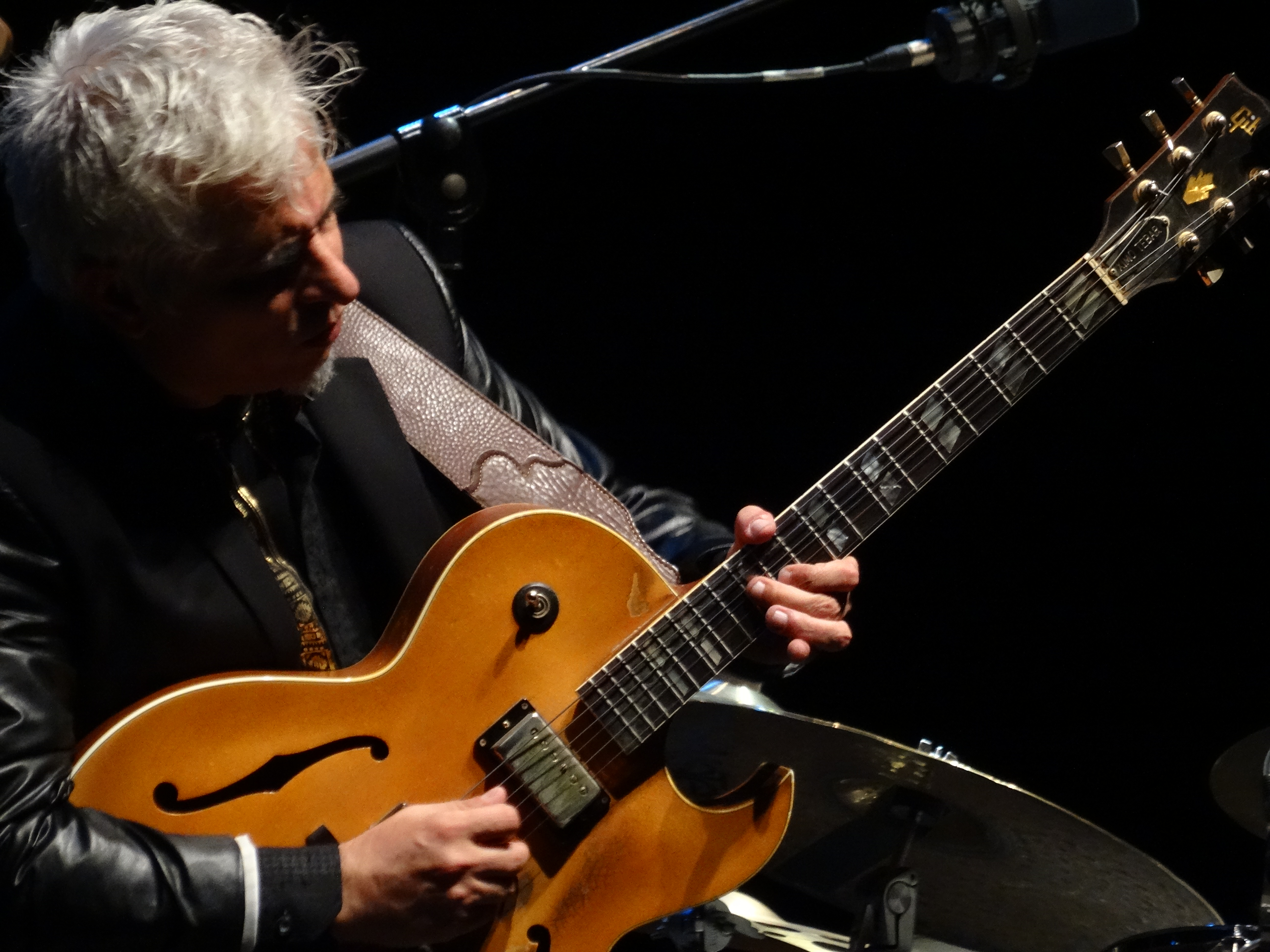 Concierto de apertura del Festival de Jazz de San Javier 2017, Ximo Tebar